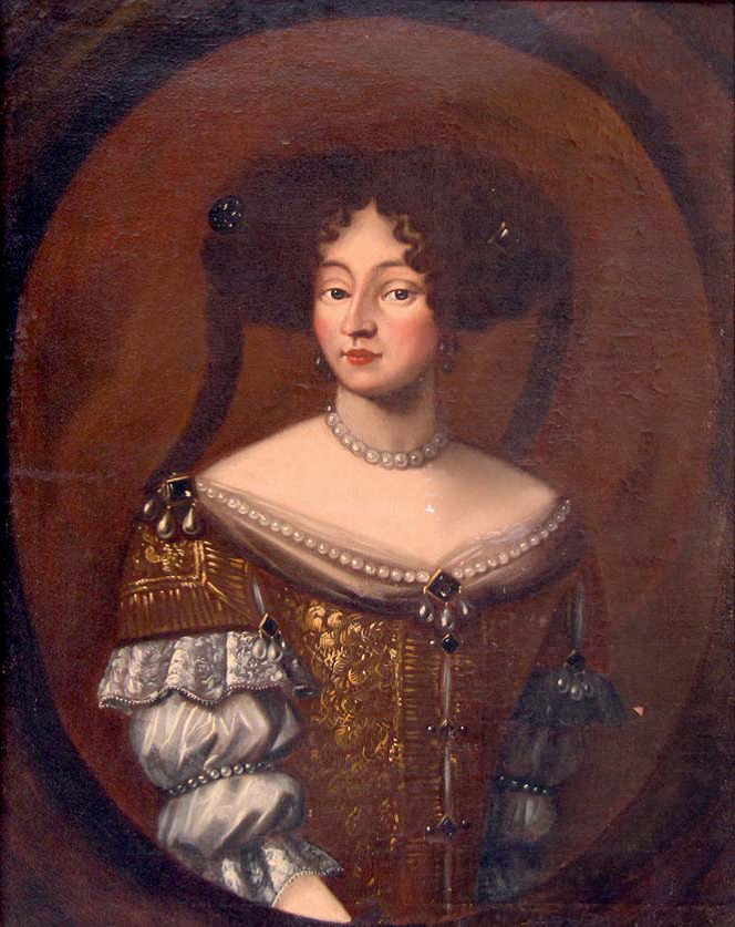 Ritratto di Anna Isabella Gonzaga di Guastalla.